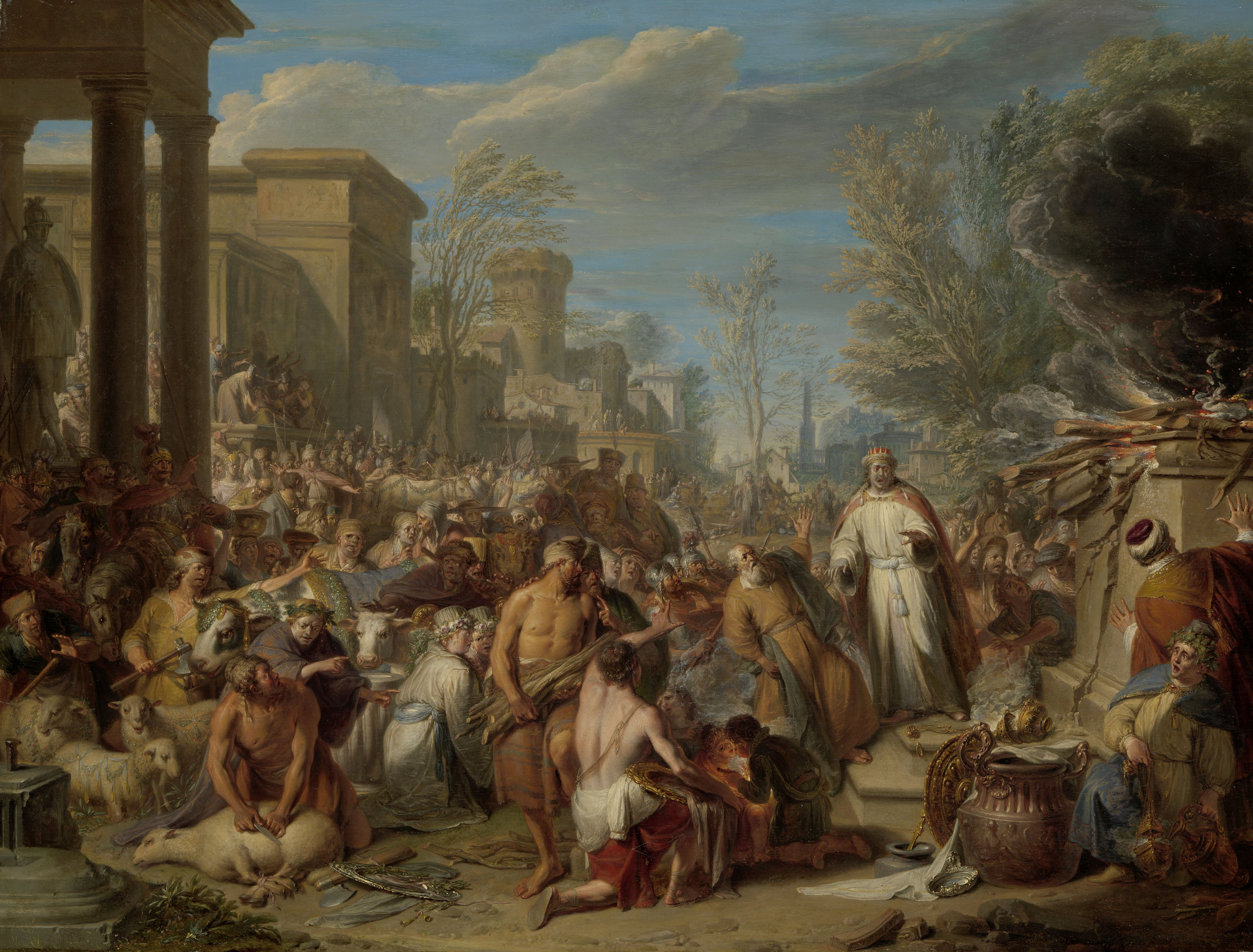 De afgoderij van Jerobeam. Tijdens het offeren aan afgoden op het plein voor de tempel breekt het altaar in stukken. De koning, de priesters en het volk kijken in afgrijzen toe. Links worden offerdieren voor de slacht klaargemaakt, rechts staan naast het altaar kostbare wierookvaten en ander vaatwerk.; Jacques Ignatius de Roore (1686-1747), olieverf op paneel, ca. 1704-1744